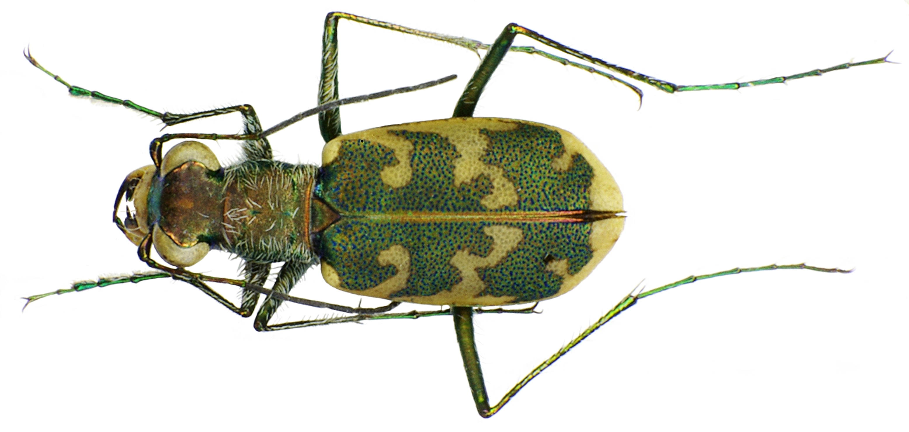 Cicindela arenaria from Hungary